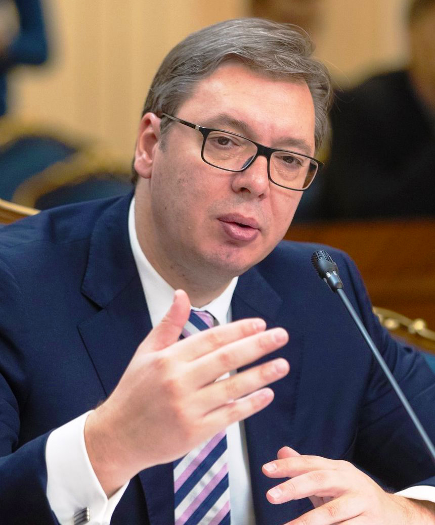 Визит президента Сербии А.Вучича в Россию, Москва, декабрь 2017